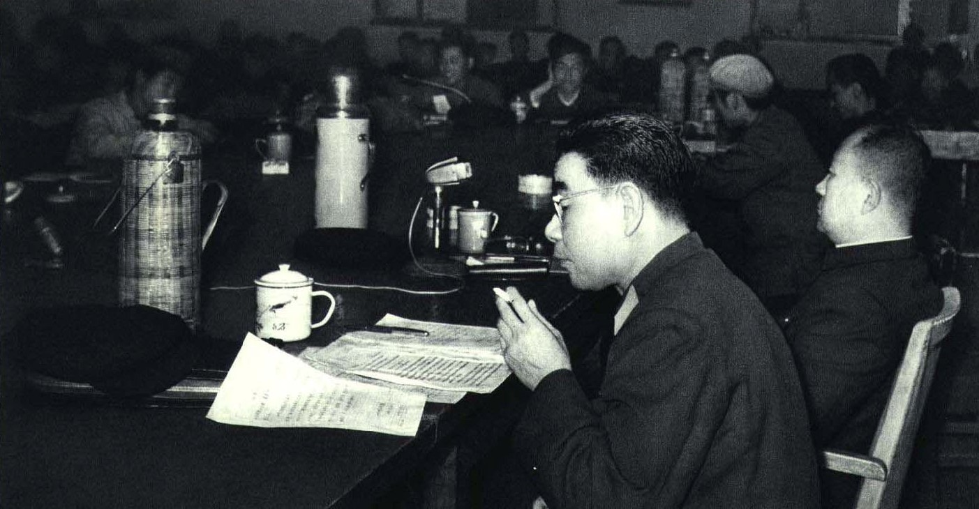 1967-07 1967年 山西省革委会 张日清刘格平